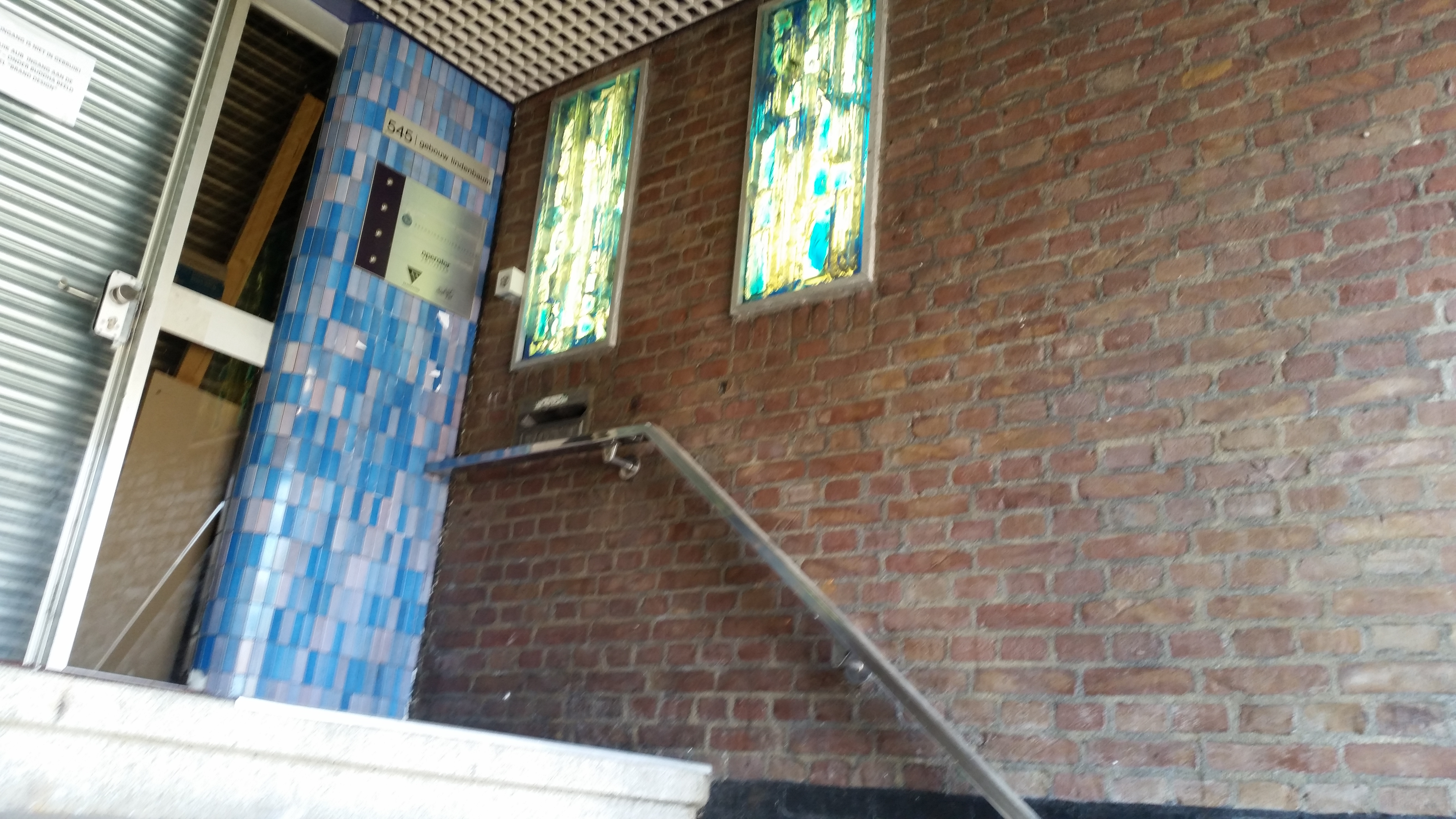 Admiraal de Ruijterweg 545-547, Amsterdam, tegeltableaus bij toegang